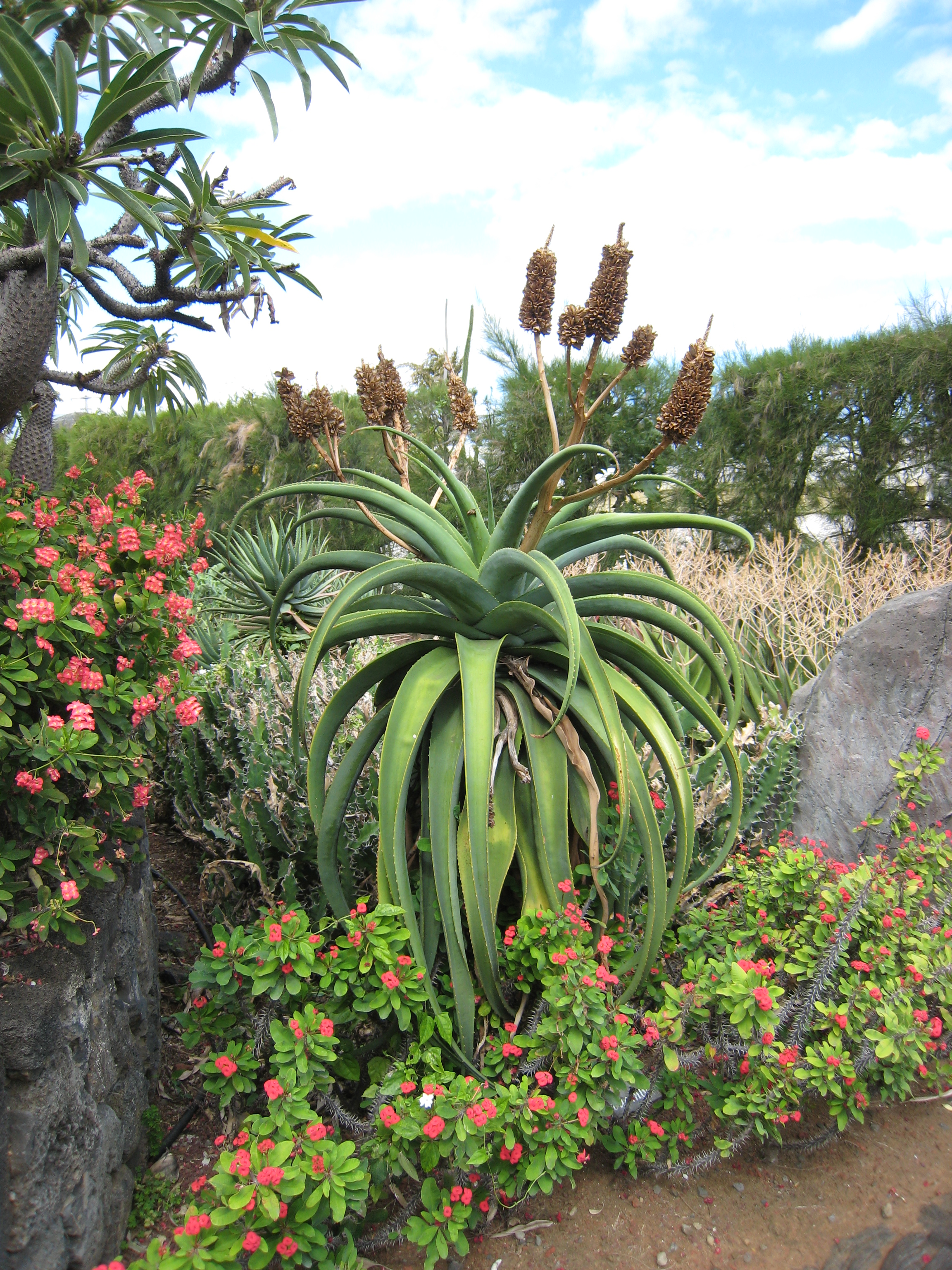 Aloe vaombe au Parc Exotica.